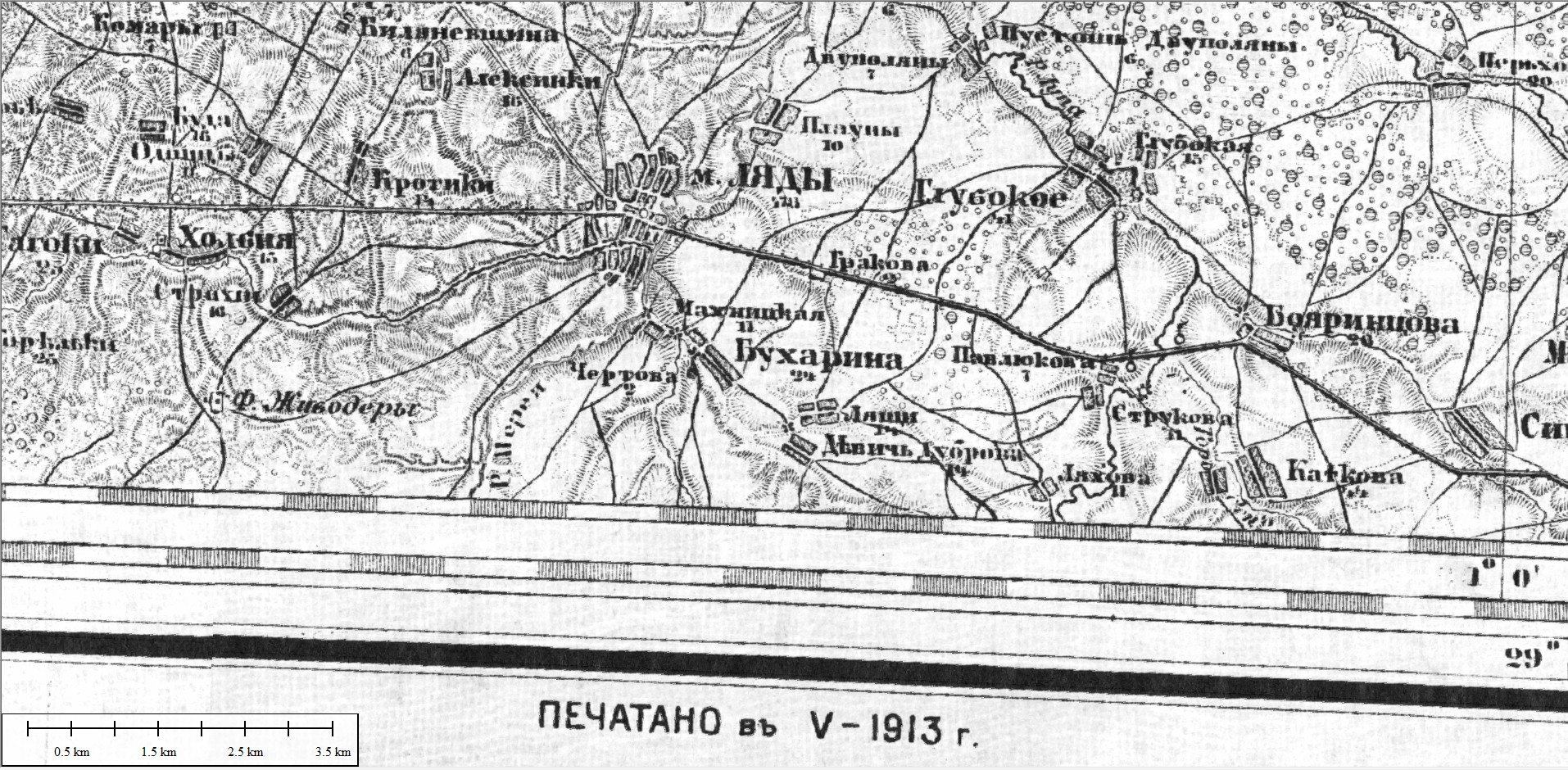 Старая карта Смоленской области, датированная 1850 г., изданная в мае 1913 г.